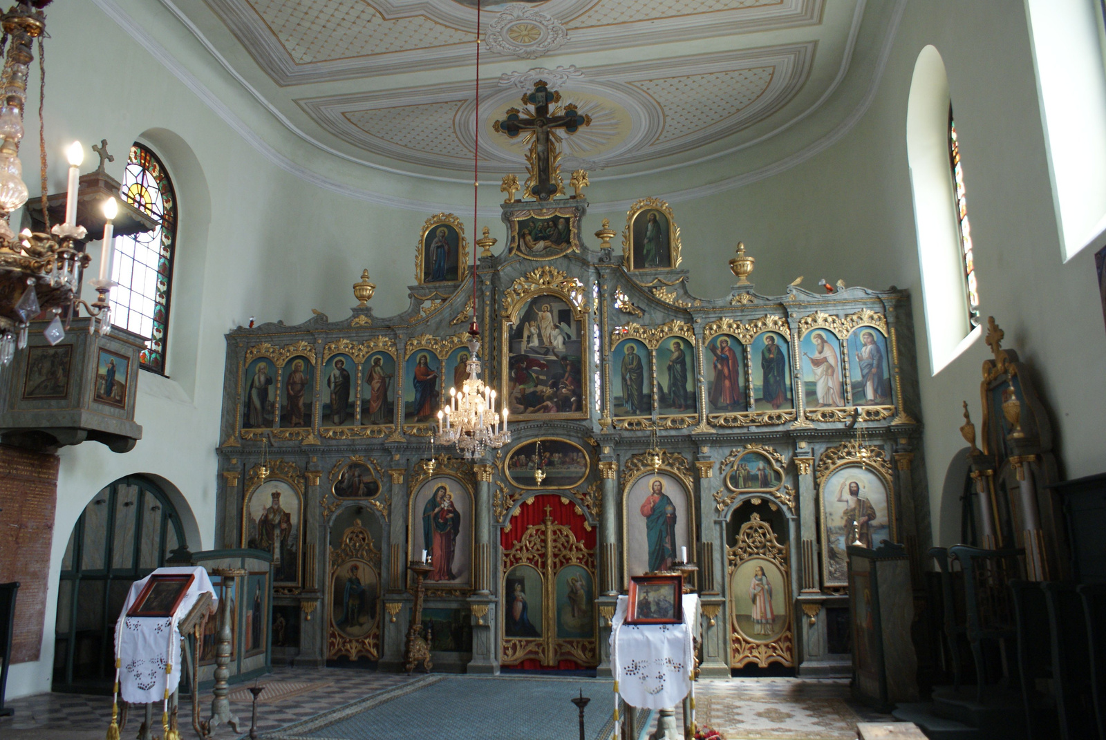 Görögkeleti templom (Szentháromság) (Kecskemét, Széchenyi tér) This is a photo of a monument in Hungary. Identifier: 2252